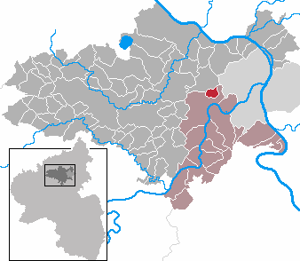 Wolken in Rhineland-Palatinate - district Mayen-Koblenz